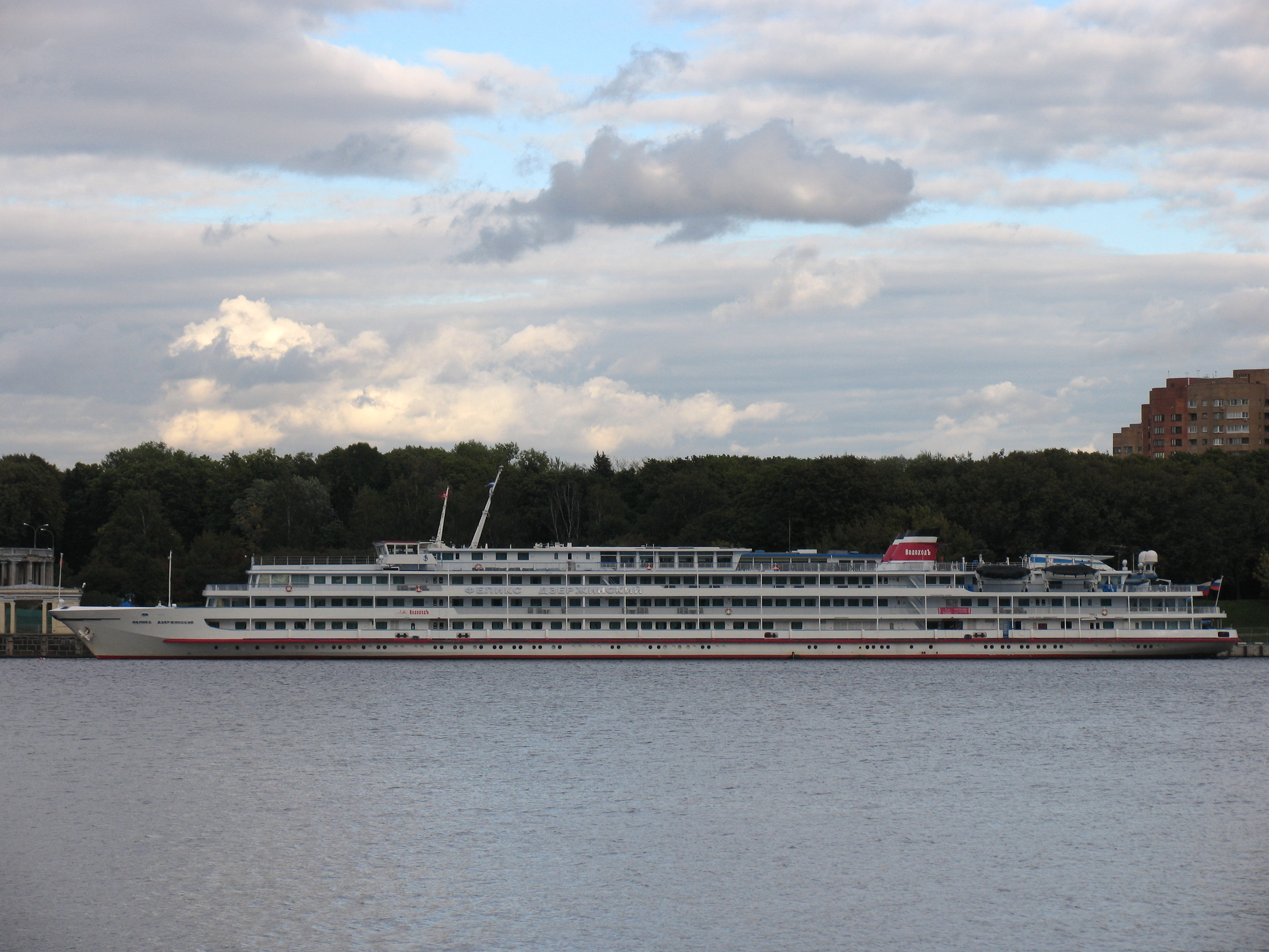 Речной круизный теплоход "Феликс Дзержинский" на Северном речном вокзале. Москва.